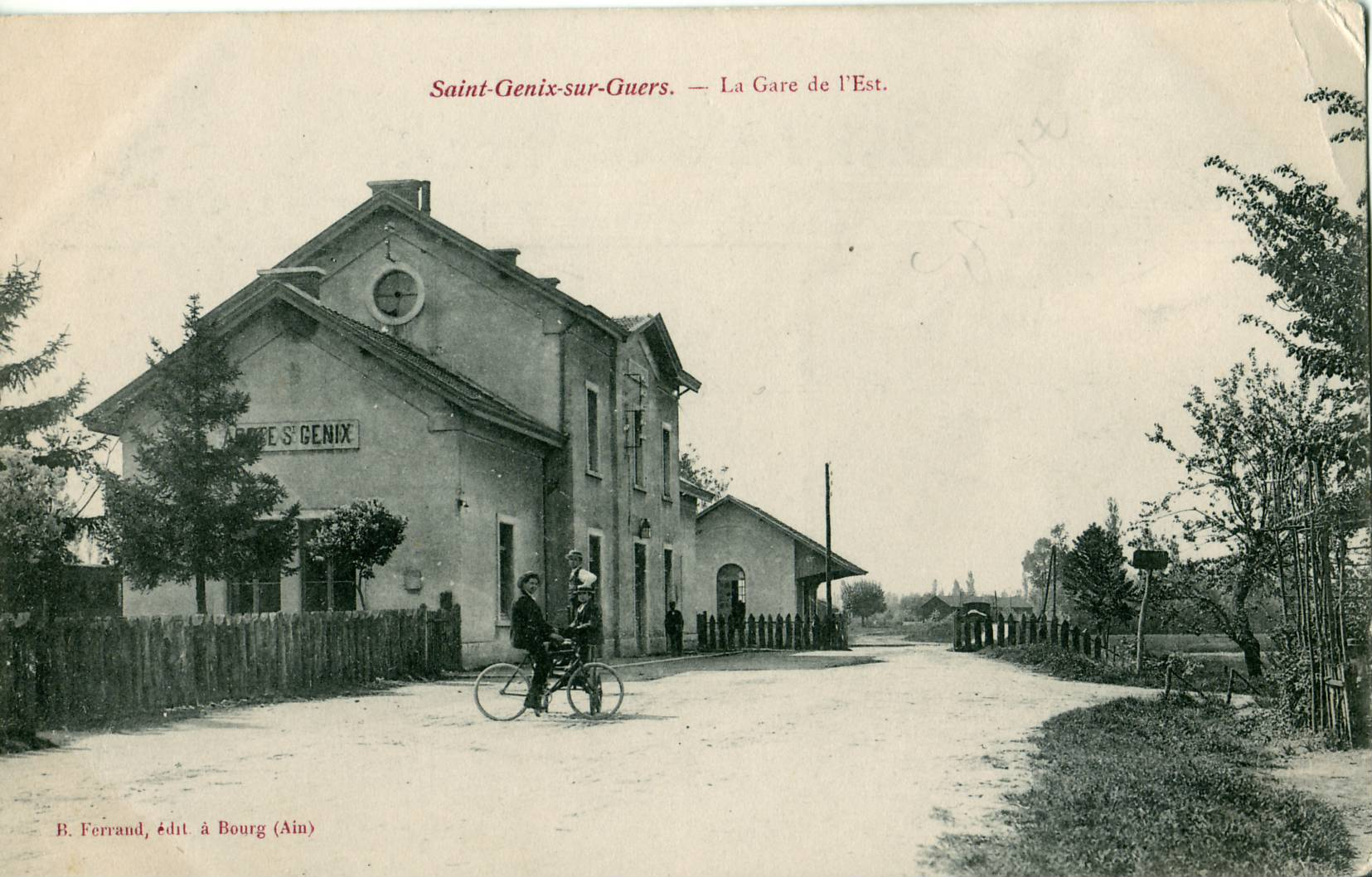 Carte postale ancienne éditée par R. Ferrand, éditeur à Bourg (Ain) Saint-Genix-sur-Guiers : La gare de l'Est